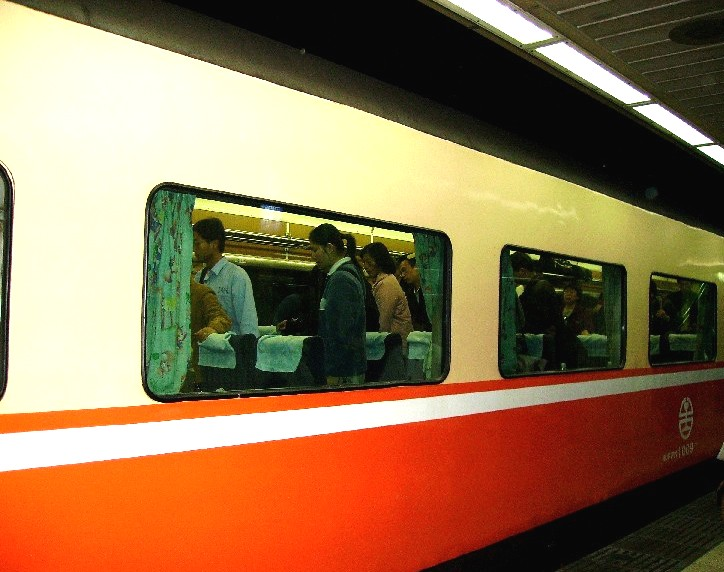 臺灣鐵路管理局莒光號客車。